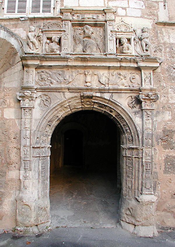 Porte des Ponteves a Barjols 846 600.jpg